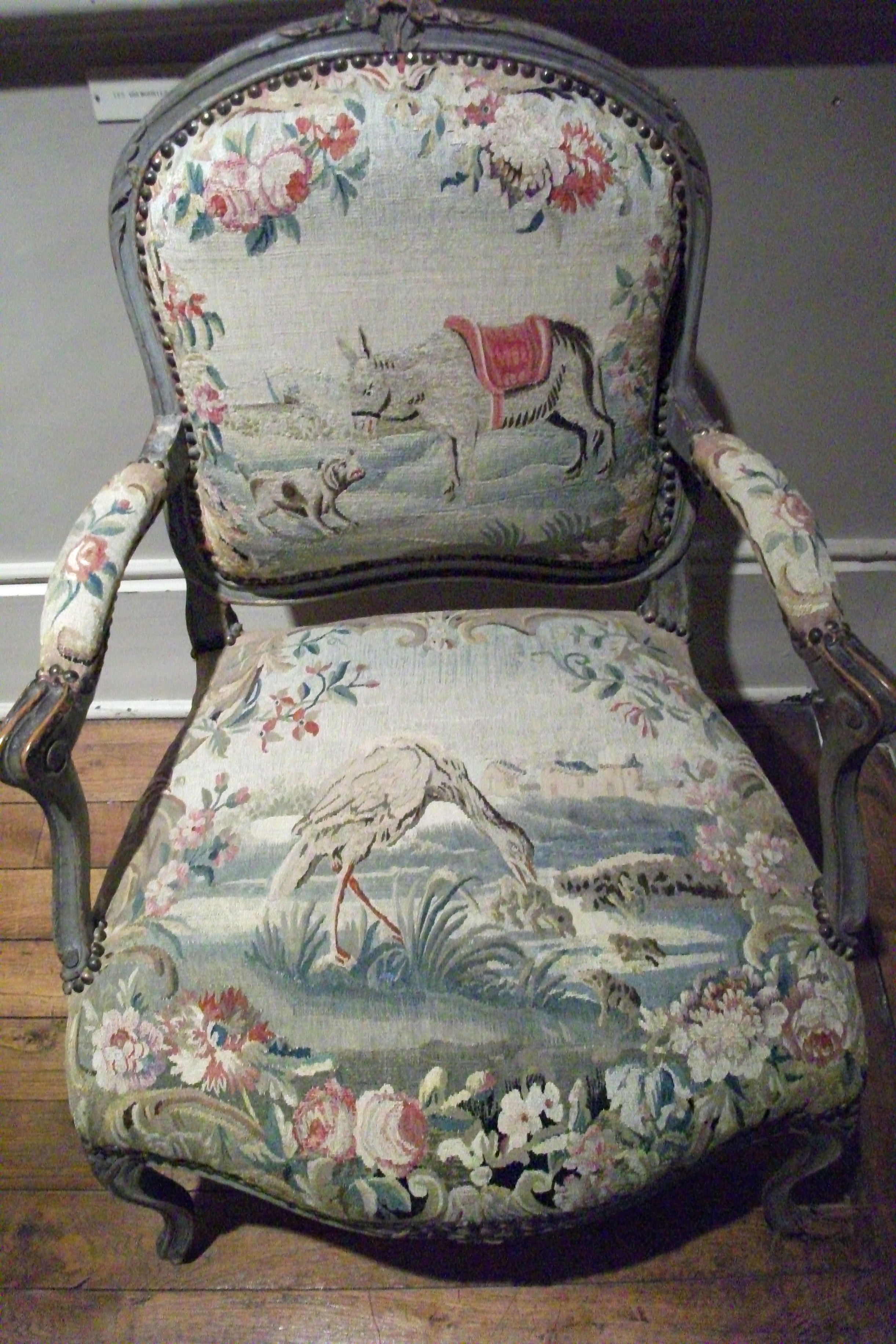 fauteuil provenant d'un lot de huit se situant au château de Sarry exposé au musée de chalons.l'âne et le chien; les grenouilles qui demandent un roi.